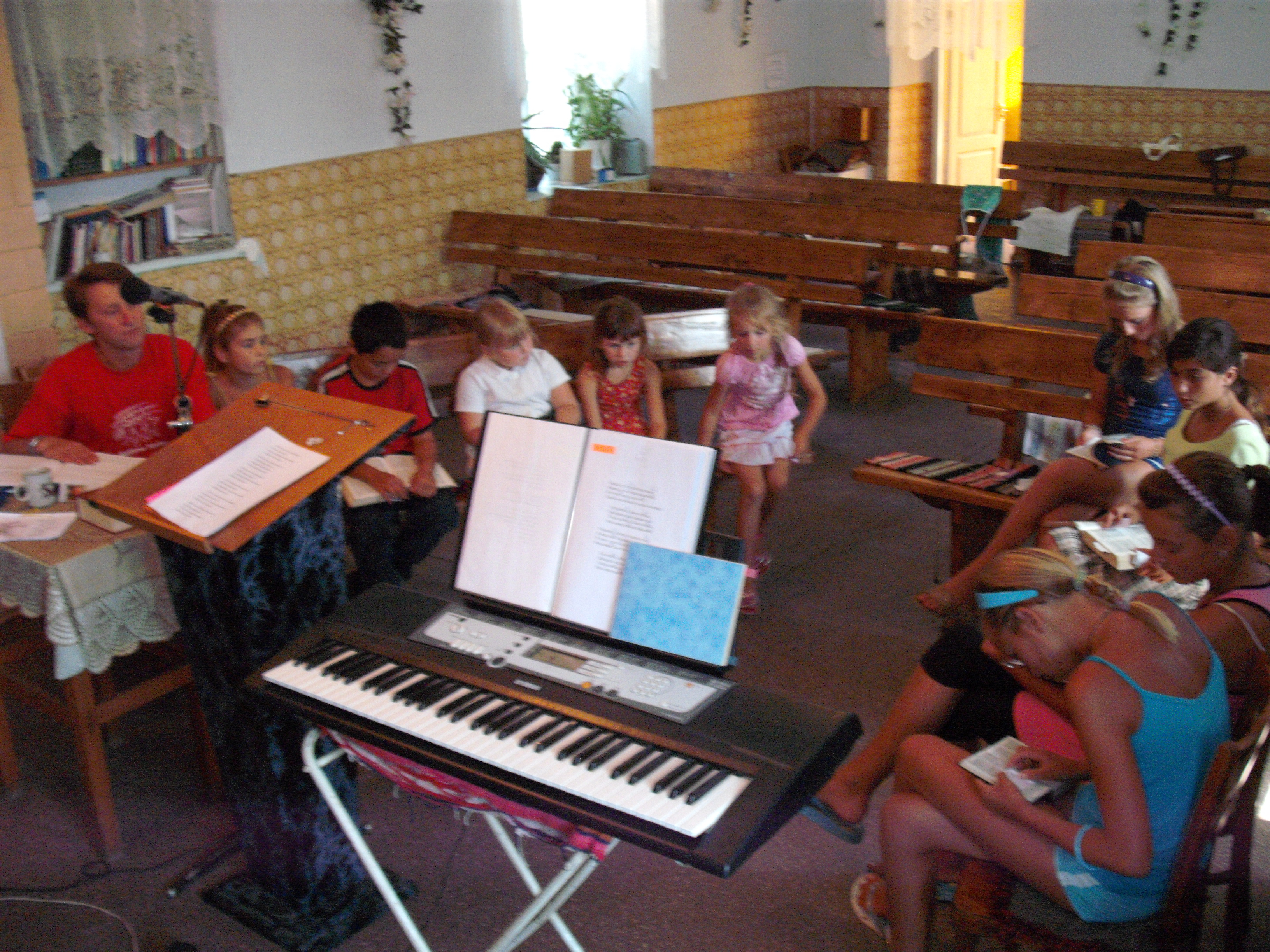 Клуб "Майбутнє України" у селі Косівка, Білгород-Дністровський район Одеської області.